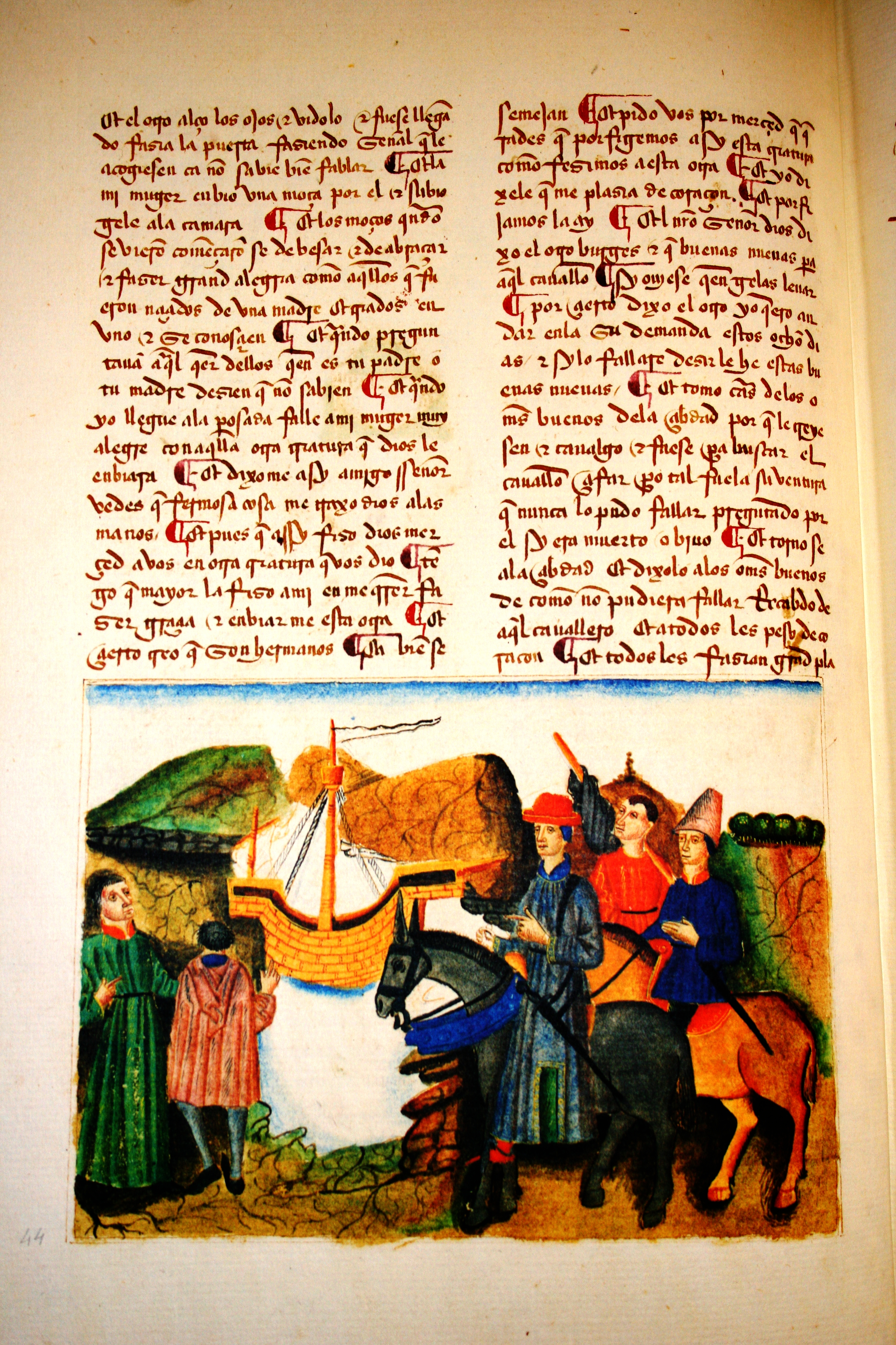 Libro del caballero Zifar, f35v.º del Manuscrito de París (ms. espagnol 36 (Bibliothèque Nationale de France)